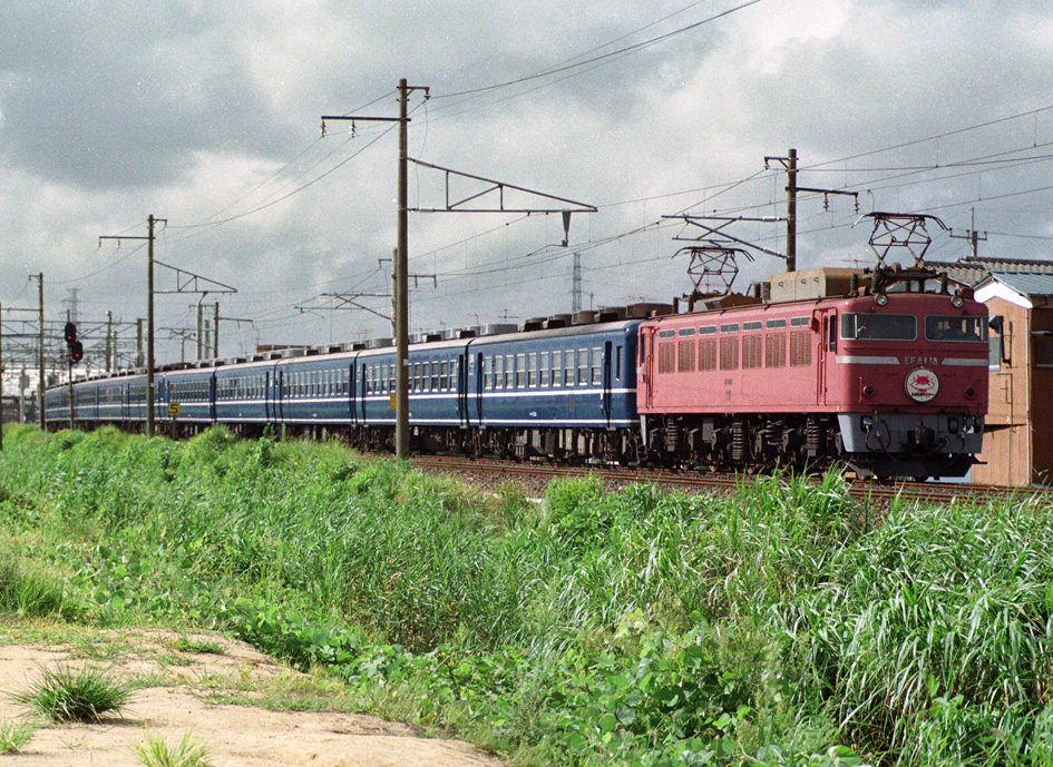 EF81 18けん引 12系客車 エキスポライナー